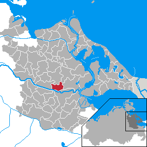 Ziethen, Landkreis Ostvorpommern, Mecklenburg-Vorpommern